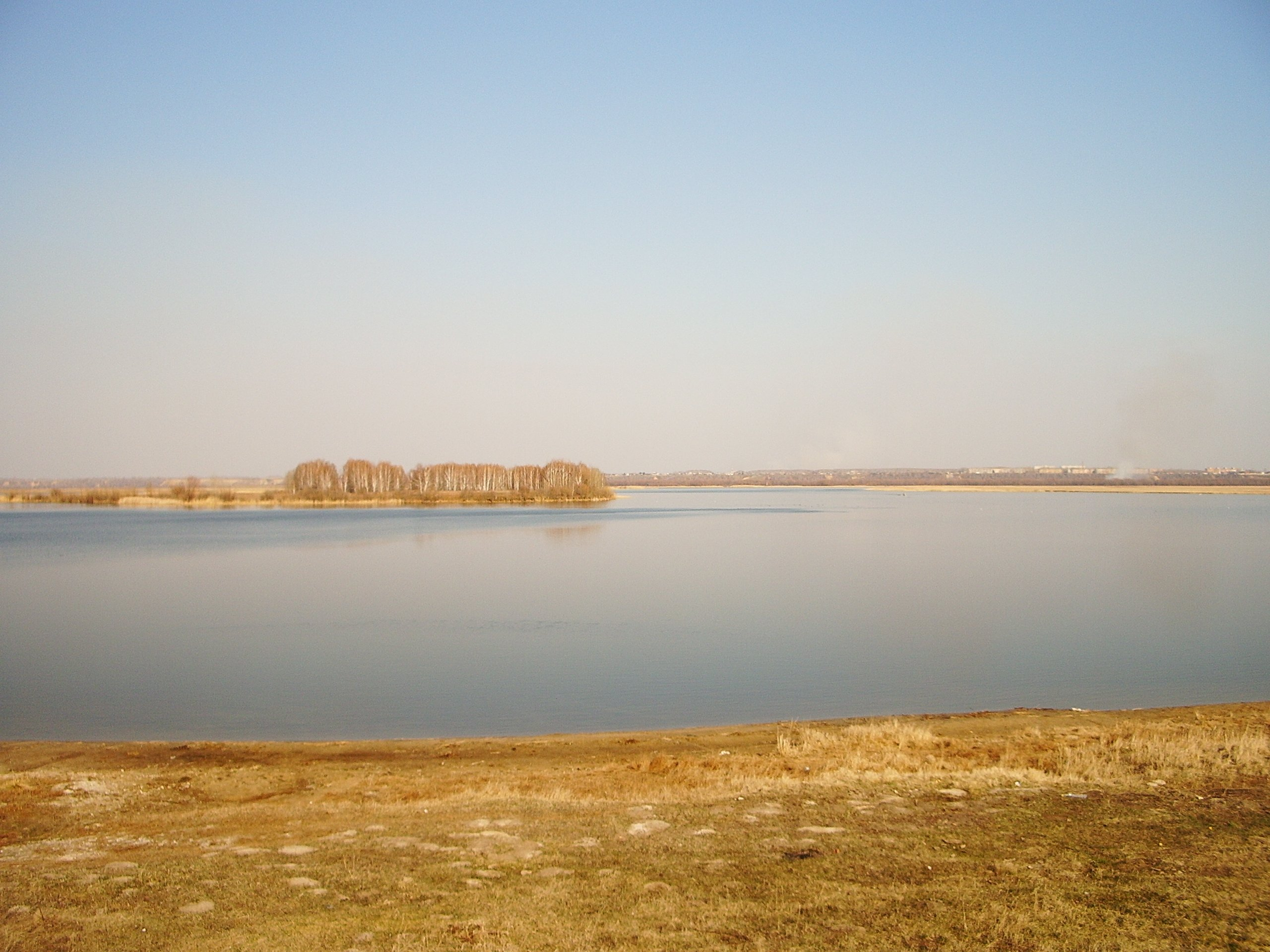 Верблюжье